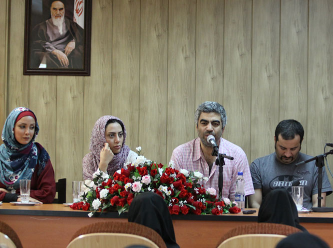 نشست خبری برخی عوامل سازنده سریال ساختمان پزشکان در انتشارات سروش.